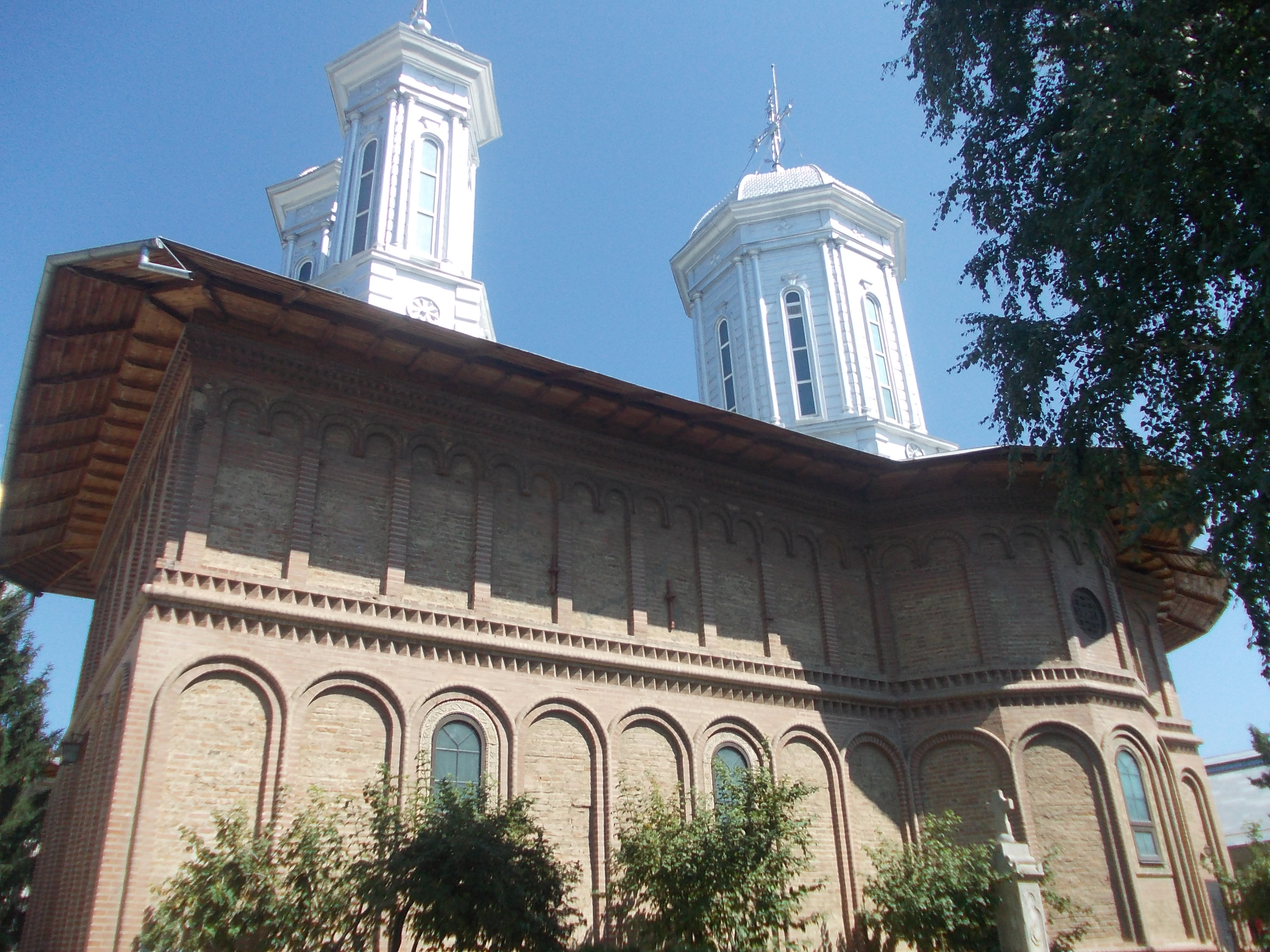 Biserica "Adormirea Maicii Domnulu 01